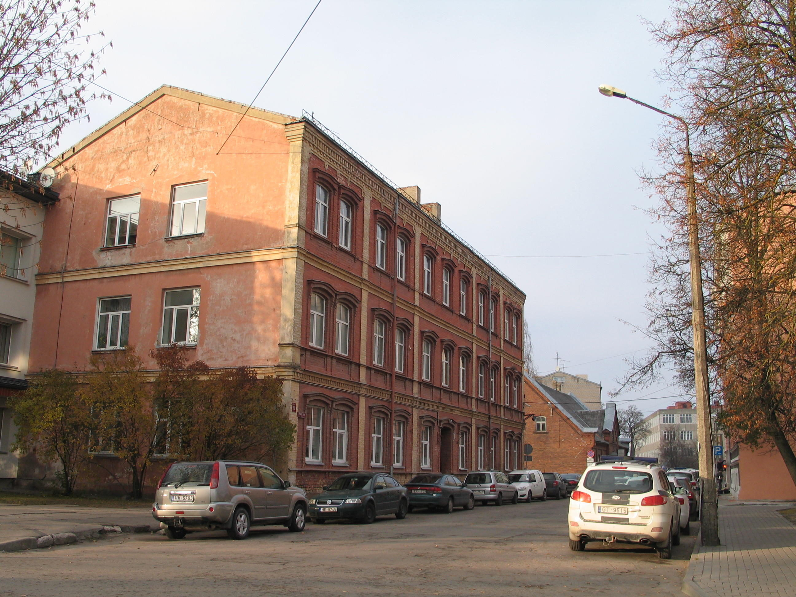 Pētera iela 10, Jelgava